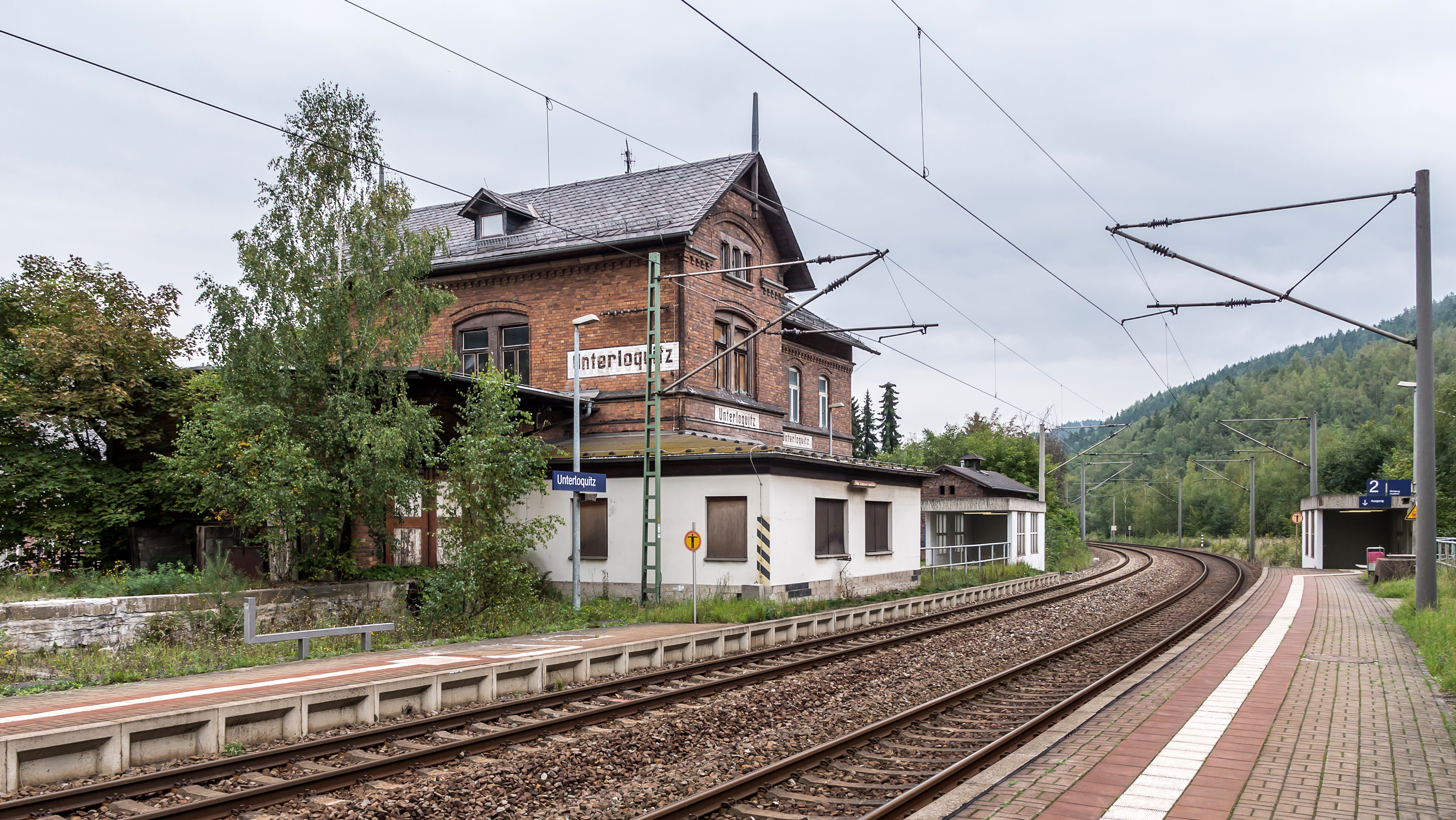 Unterloquitz Bahnhof